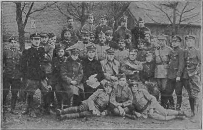 jako kapelan armii polskiej, fotografia opublikowana w Głos Karmelu z 1936 roku.